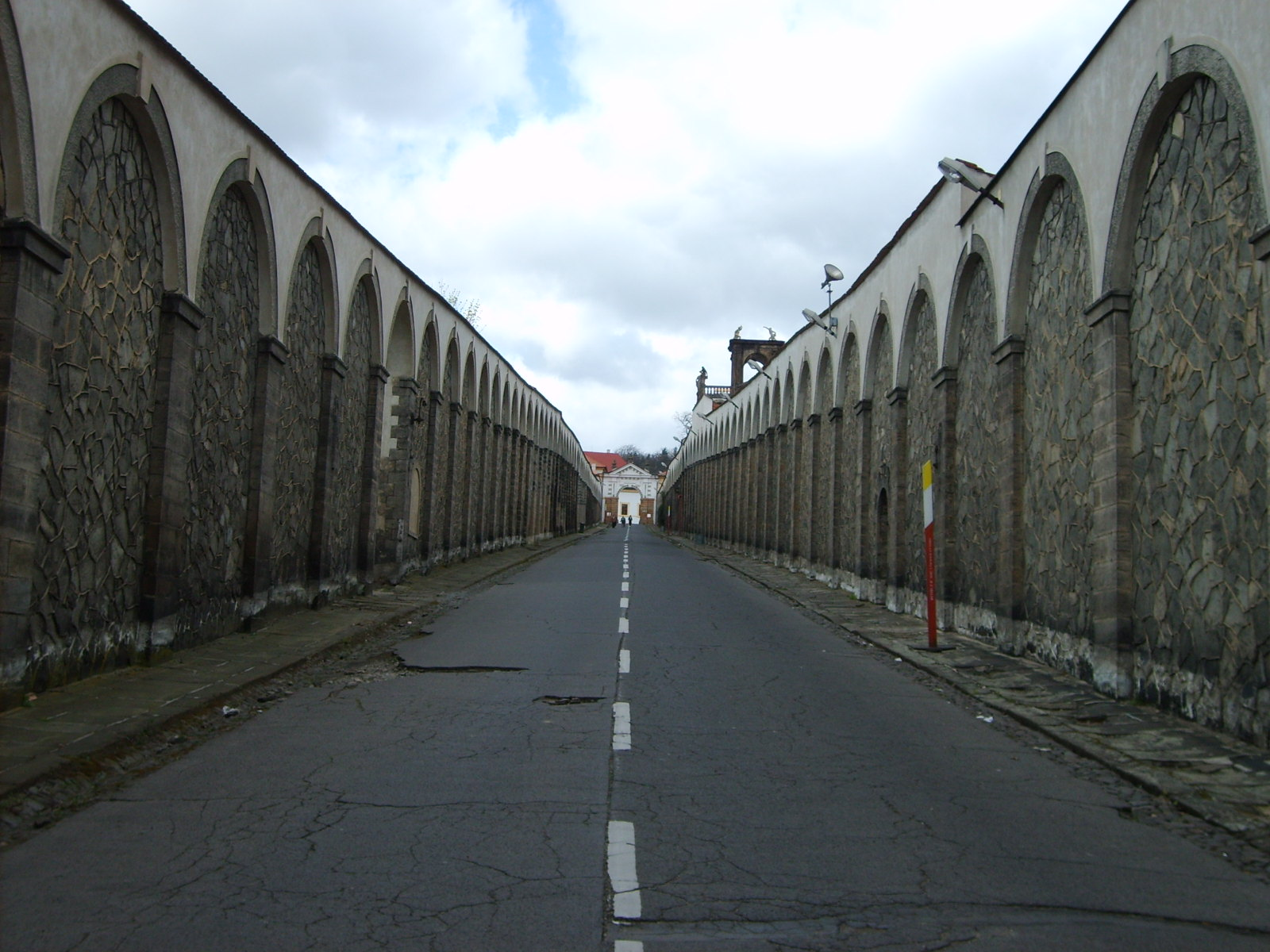 Přístupová cesta k děčínskému zámku-Dlouhá jízda.